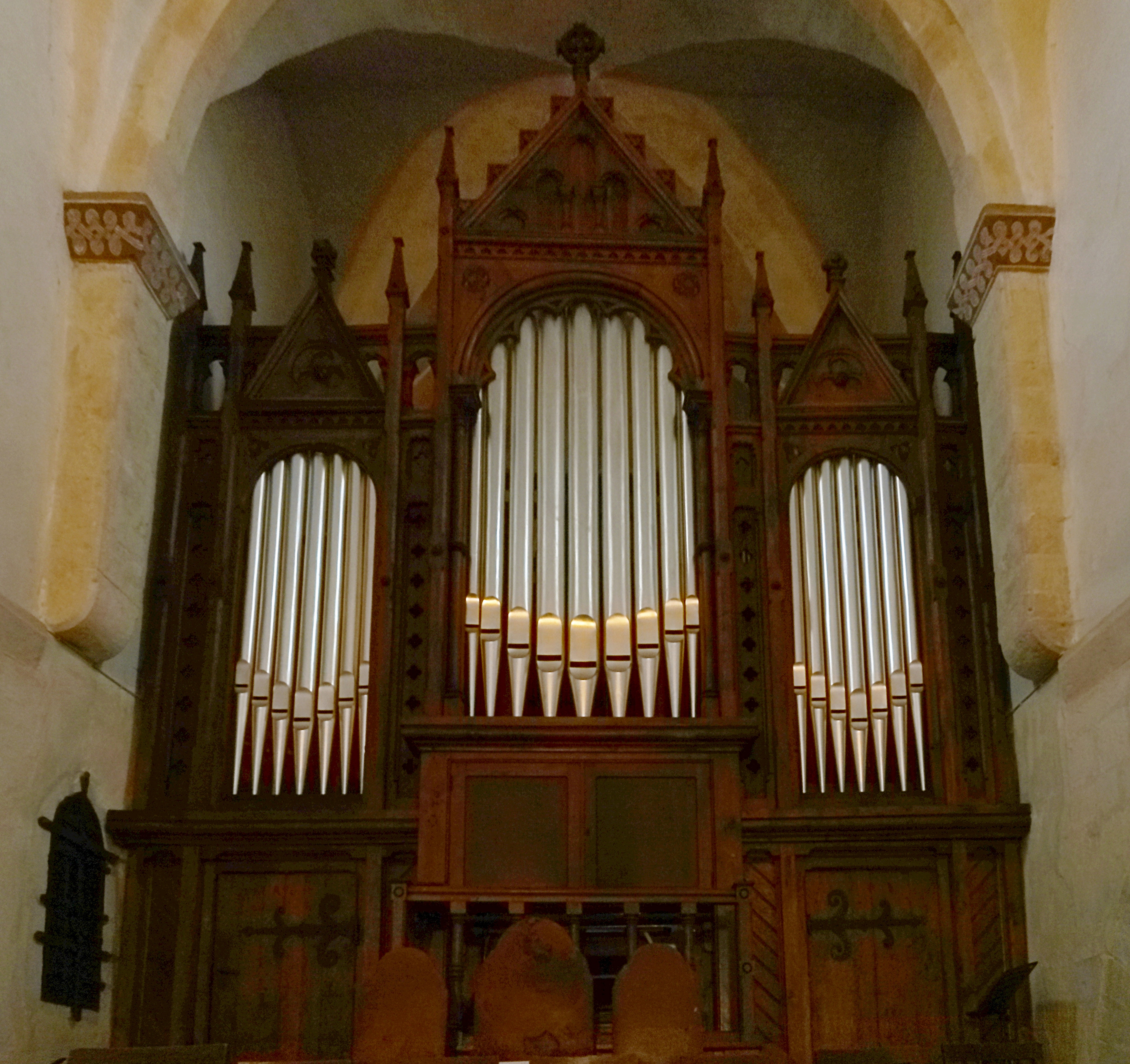 Die Orgel von Julius Alexander Strobel (1858) wurde 2010 durch Sauer Orgelbau restauriert.